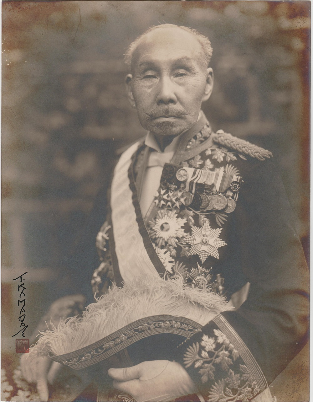 長崎省吾の肖像写真